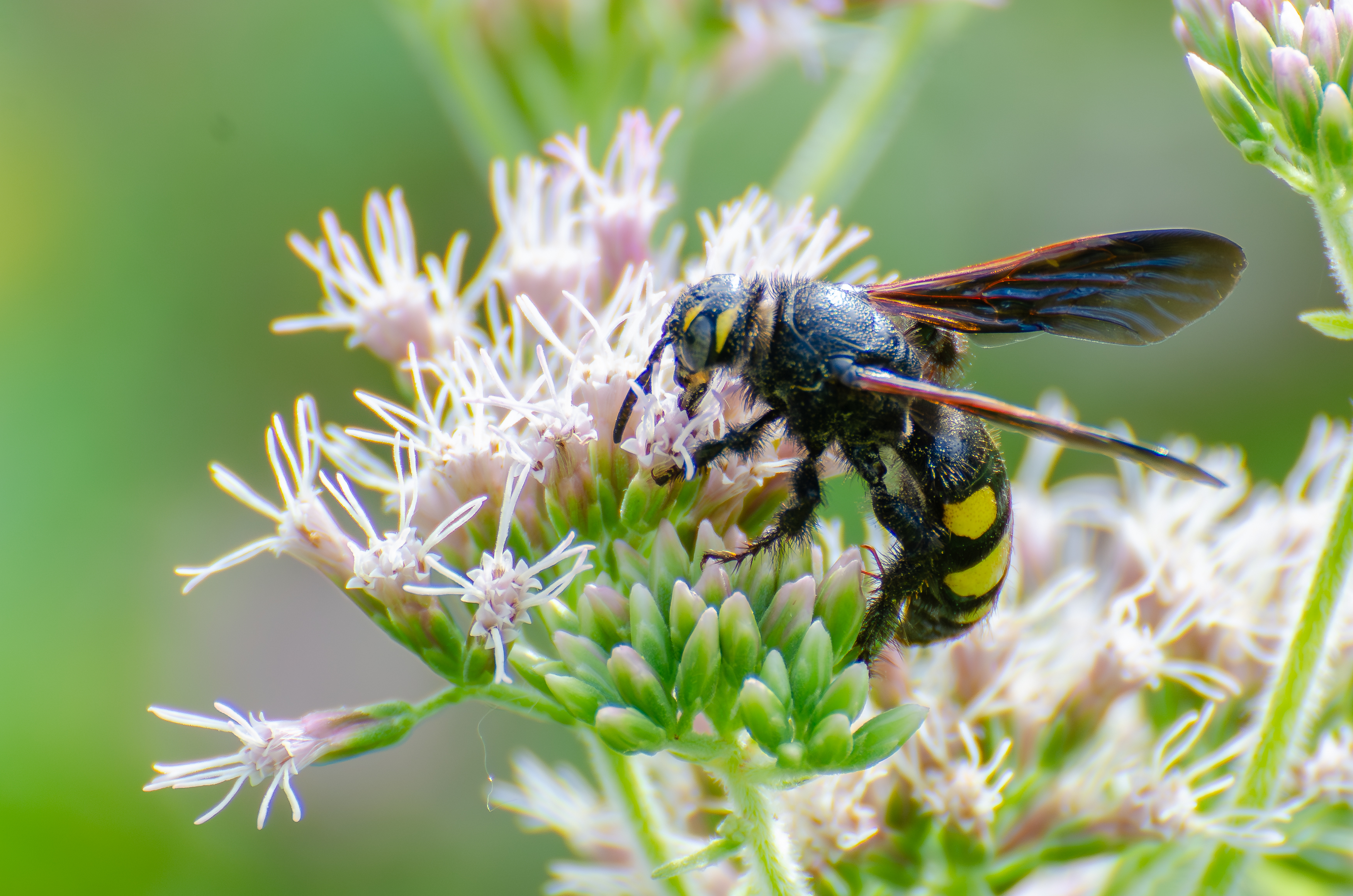 Colpa sexmaculata